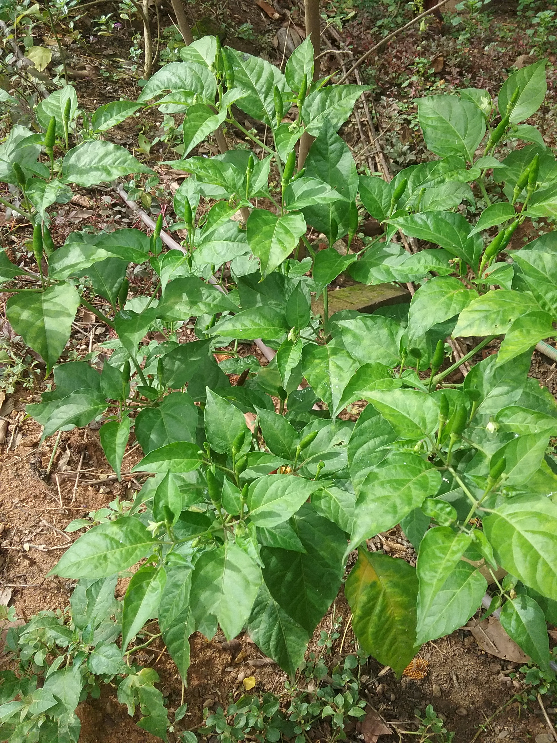 காந்தாரி மிளகாய் செடி